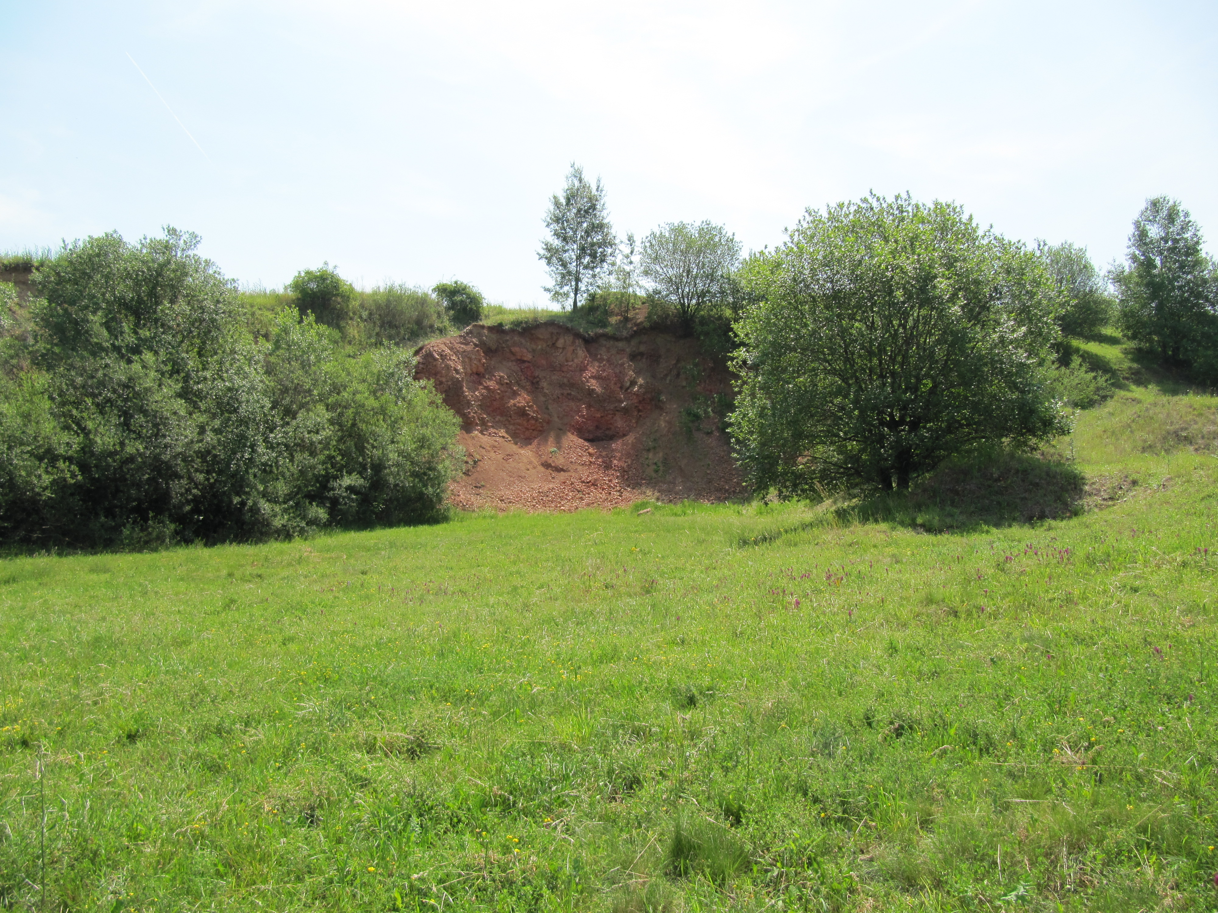 Medlovický lom